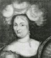 Elisabeth Freiin Ungnad von Weissenwolf, seit 1652 Ungnad Gräfin von Weissenwolff (1603/14–1683), Tochter des österreichischen Exulanten Andreas Ungnad von Weissenwolf, Patenkind der Gräfin Elisabeth von Oldenburg, Geliebte von deren Sohn Anton Günther von Oldenburg, Hofdame der Fürstin Juliane von Ostfriesland, Ehefrau des ostfriesischen Geheimen Rats von Marenholtz, Mutter des Grafen Anton I. von Aldenburg